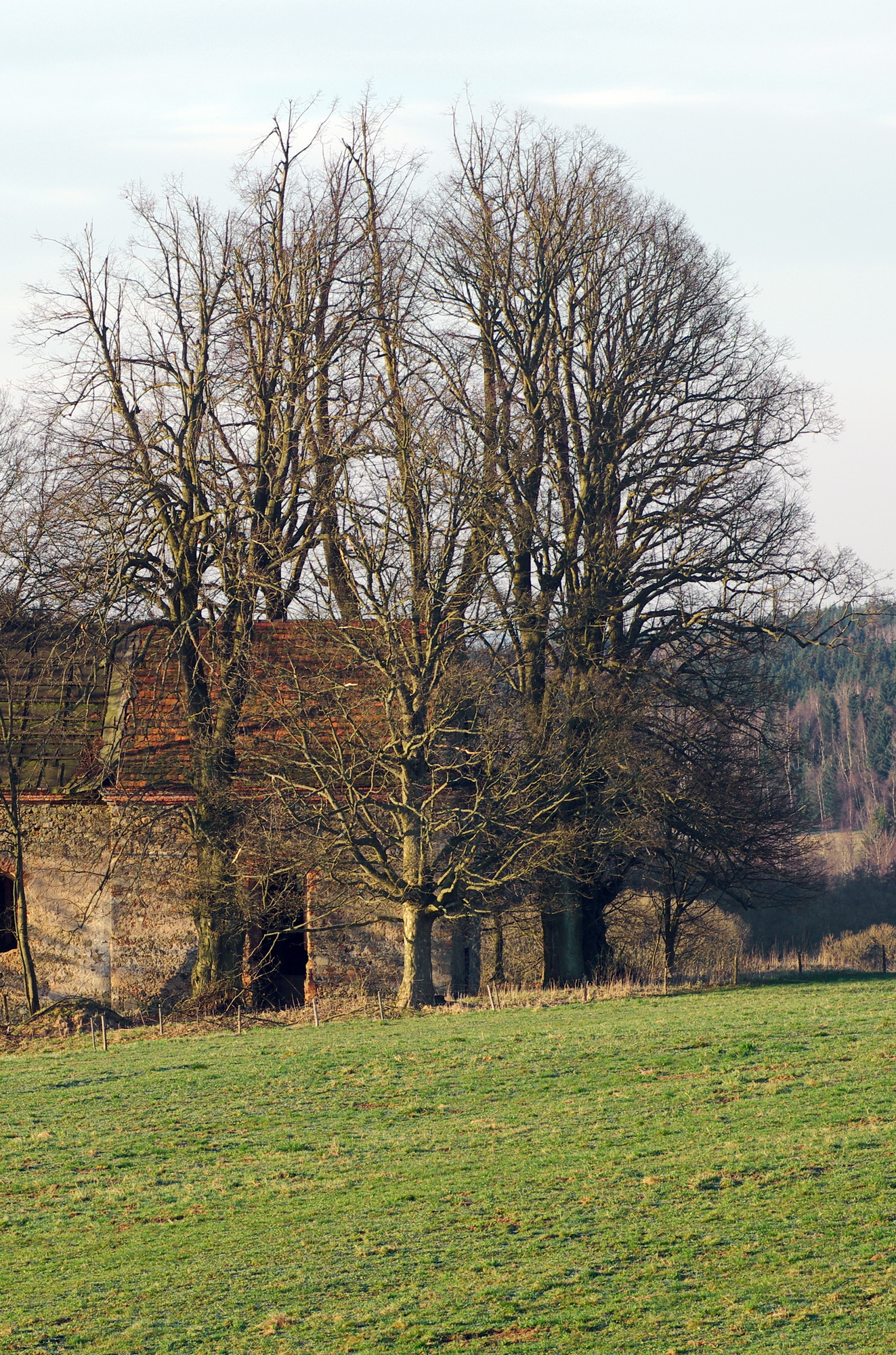 Památné stromy Jakobovy lípy, Bochov, okres Karlovy Vary. Uprostřed nich kostel svatého Jakuba.